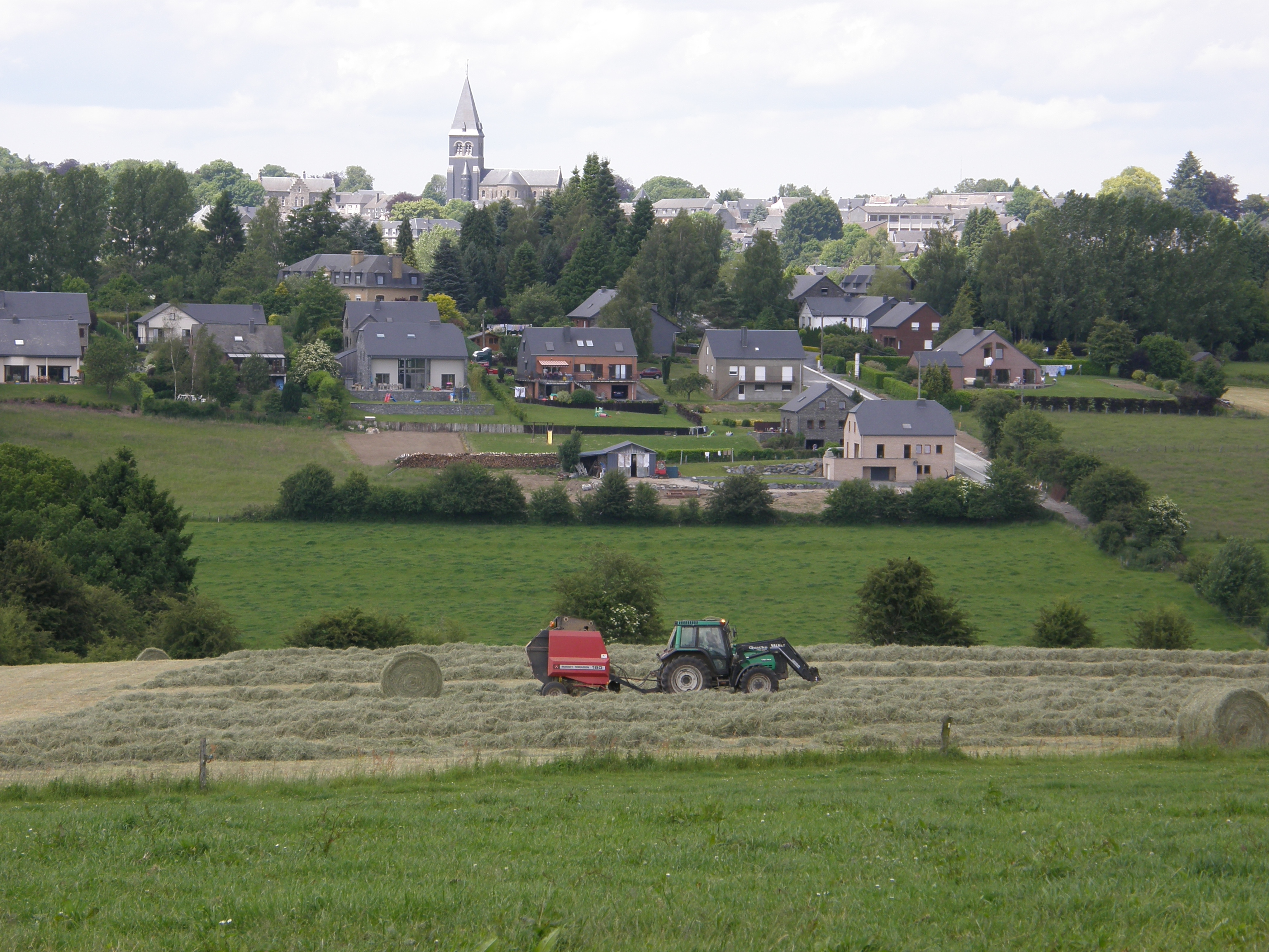 vue de bertrix, de son eglise et de la rue de la venne